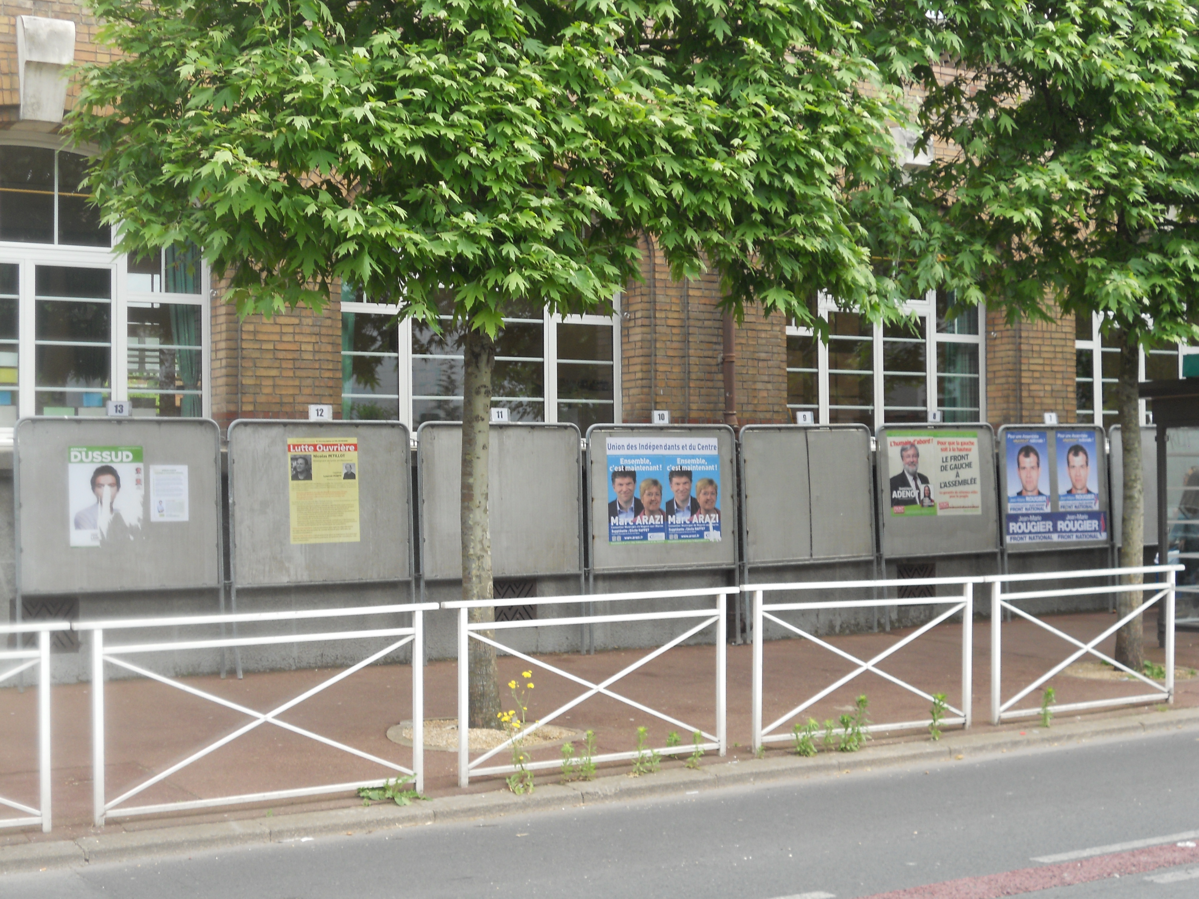 Panneaux de campagne électorale pour les législatives de 2012 en France, dans la 5e circonscription du Val-de-Marne.